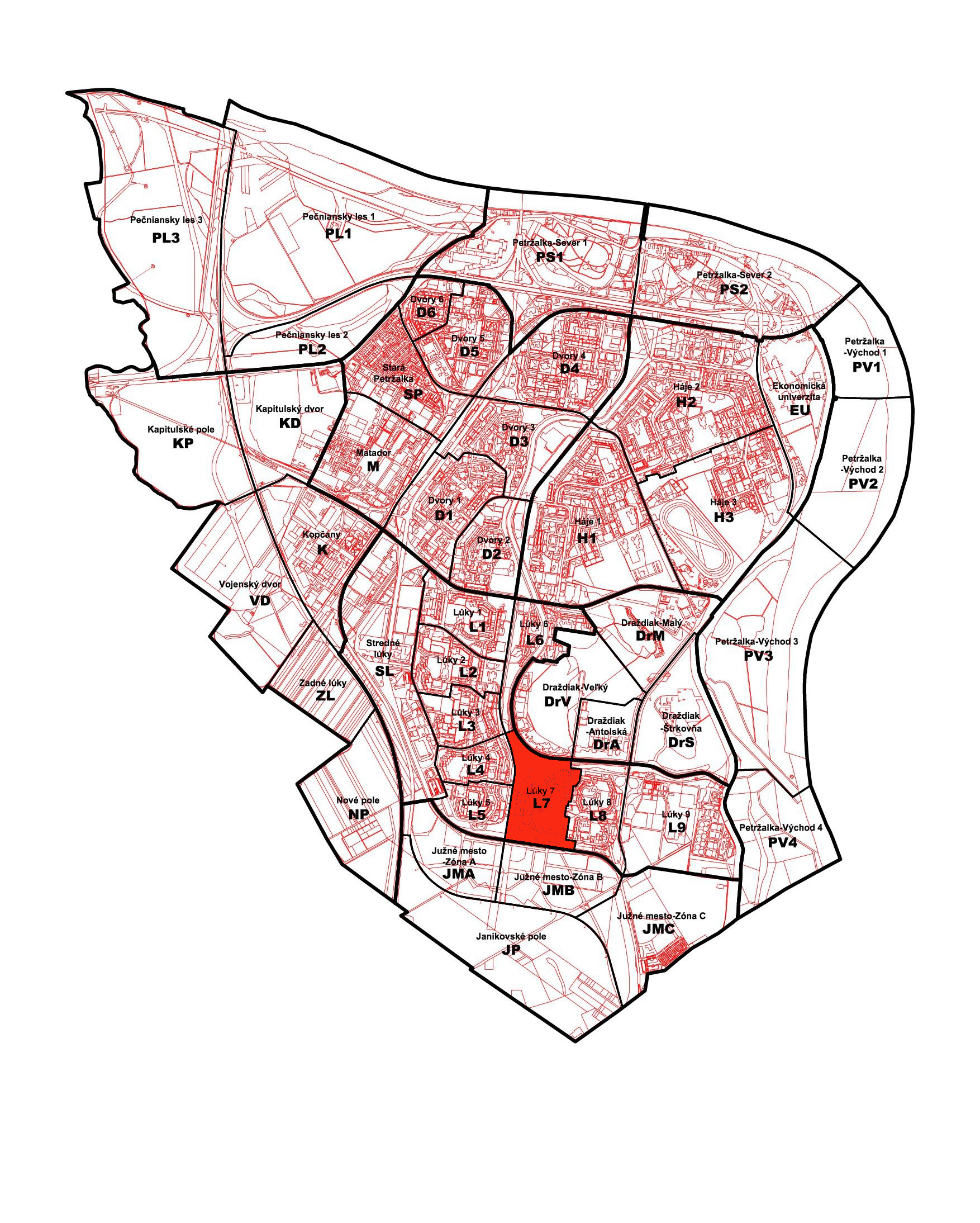 Poloha petržalskej miestnej časti